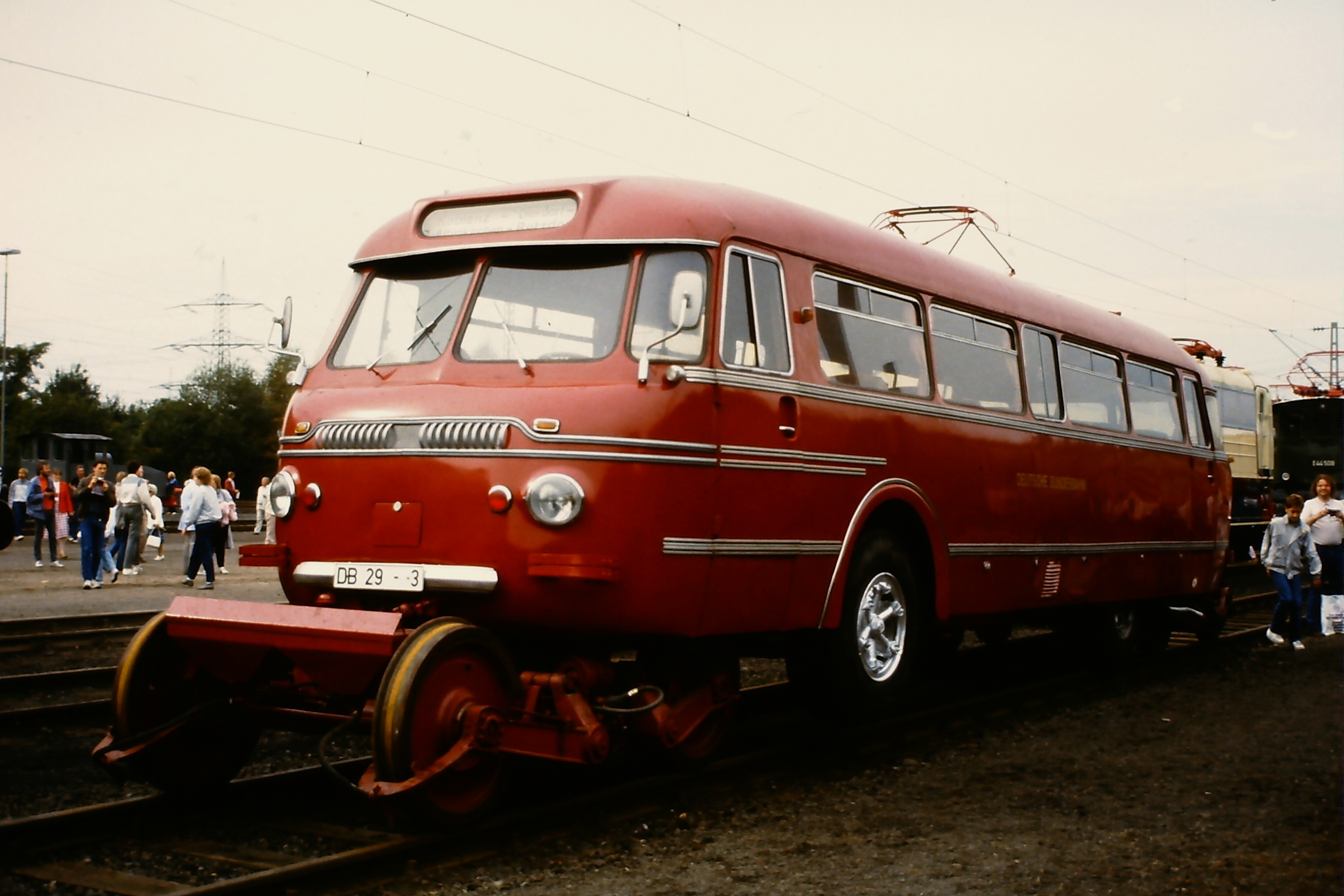 Schiene-Straßenbus, ausgestsellt auf der Fahrzeugschau 150 Jahre deutsche Eisenbahn in Bochum-Dahlhausen